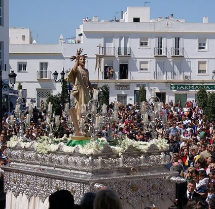 resucitado